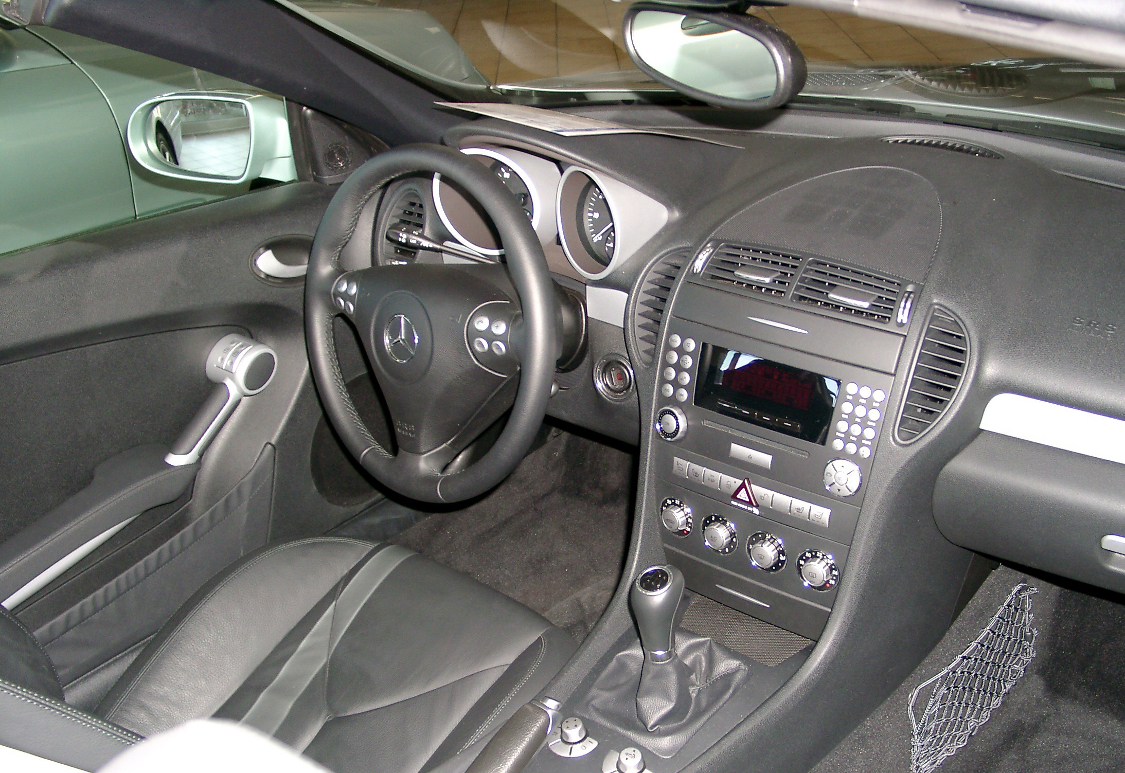 Mercedes-Benz SLK-Klasse (R171), Dashboard